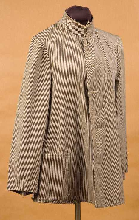 Läggerrock m/1870 Identifikationsnr: AM.004024 Samling: Armémuseum